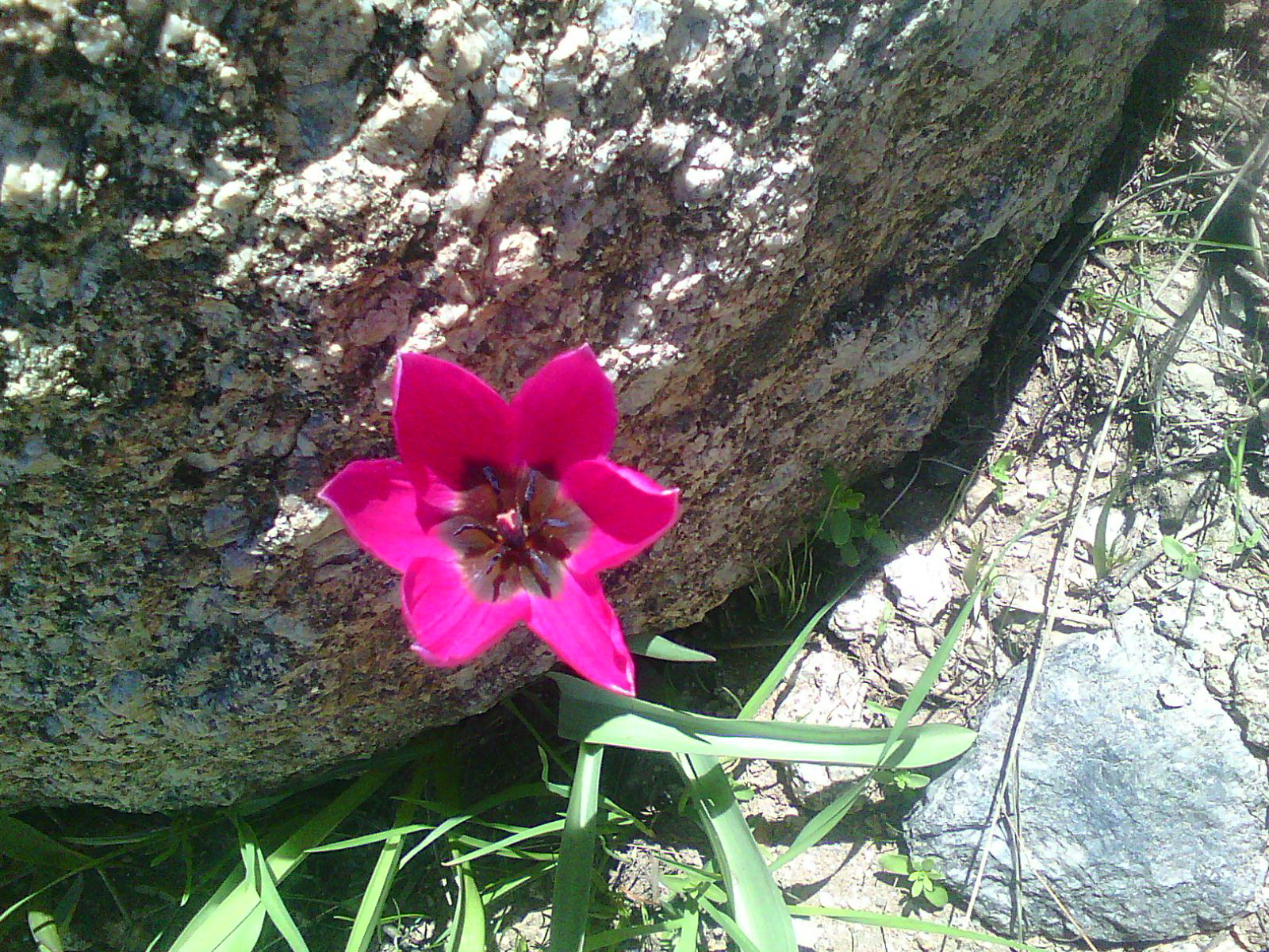 لاله آزاد کوهستان الوند